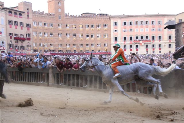 Momenti del Palio di Provenzano 2010 vinto dalla Selva con Silvano Mulas e Fedora Saura